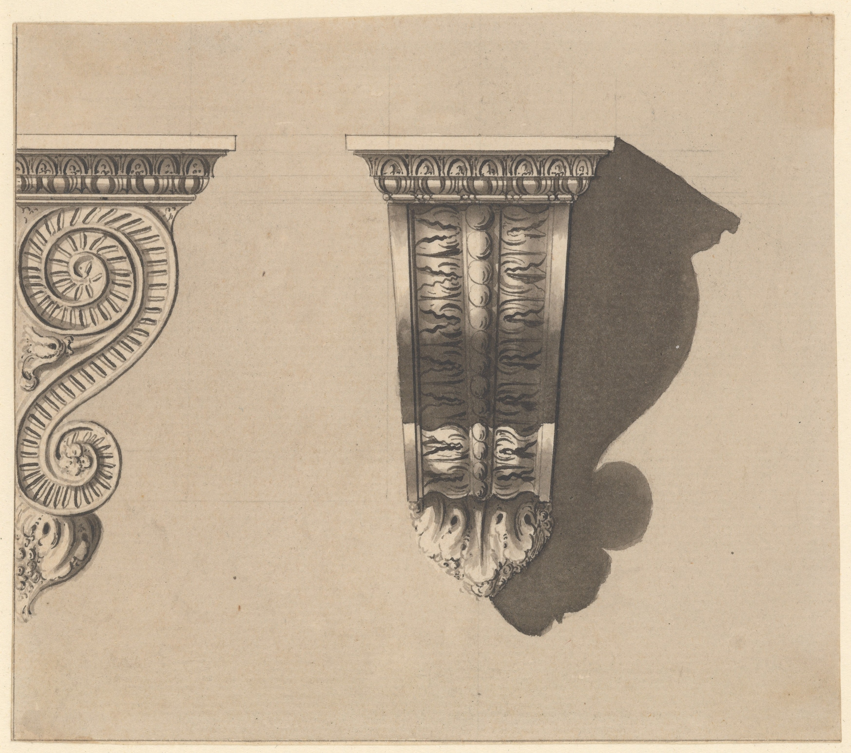 Drawing; Drawings